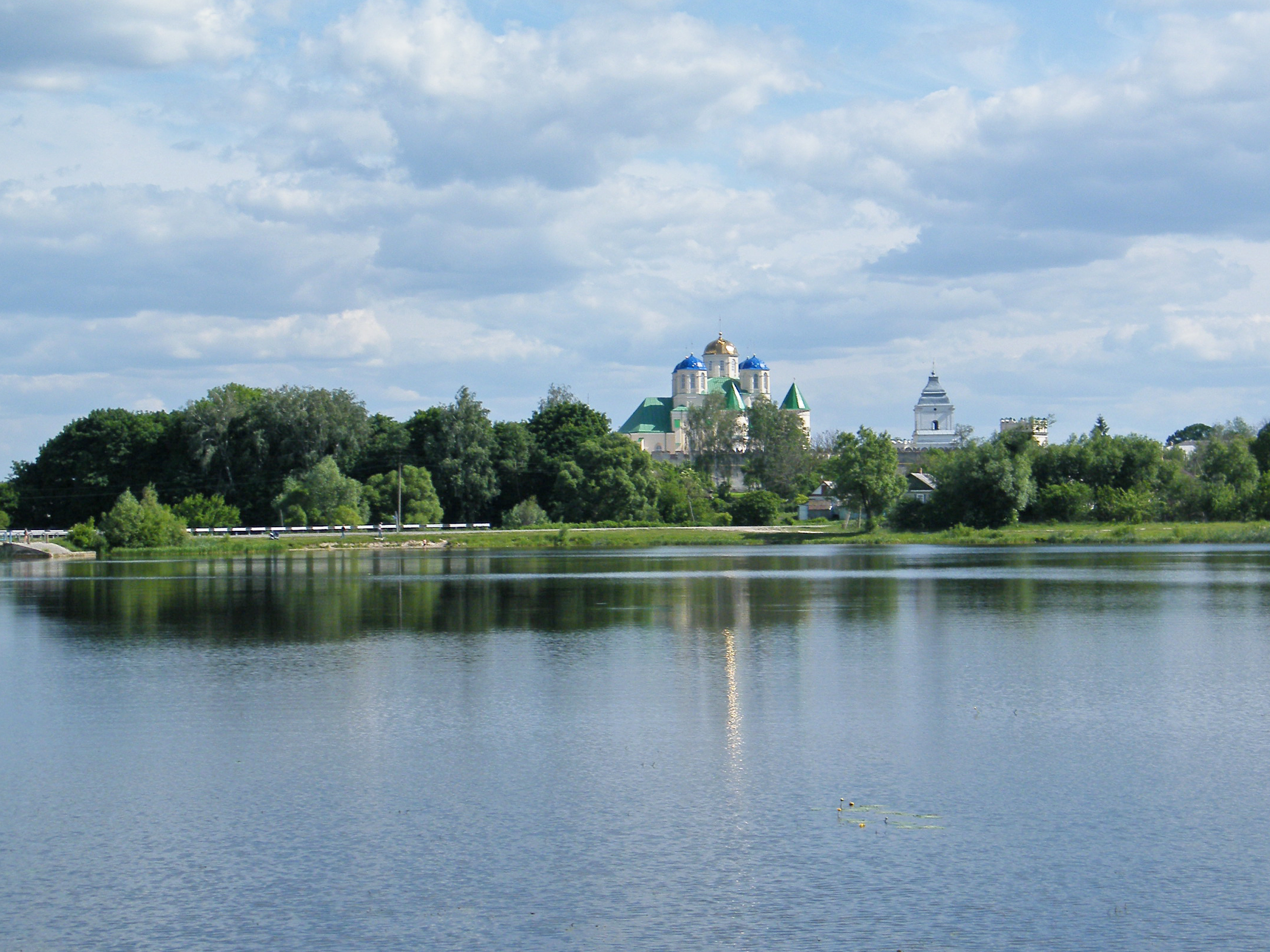 Вид на монастырь